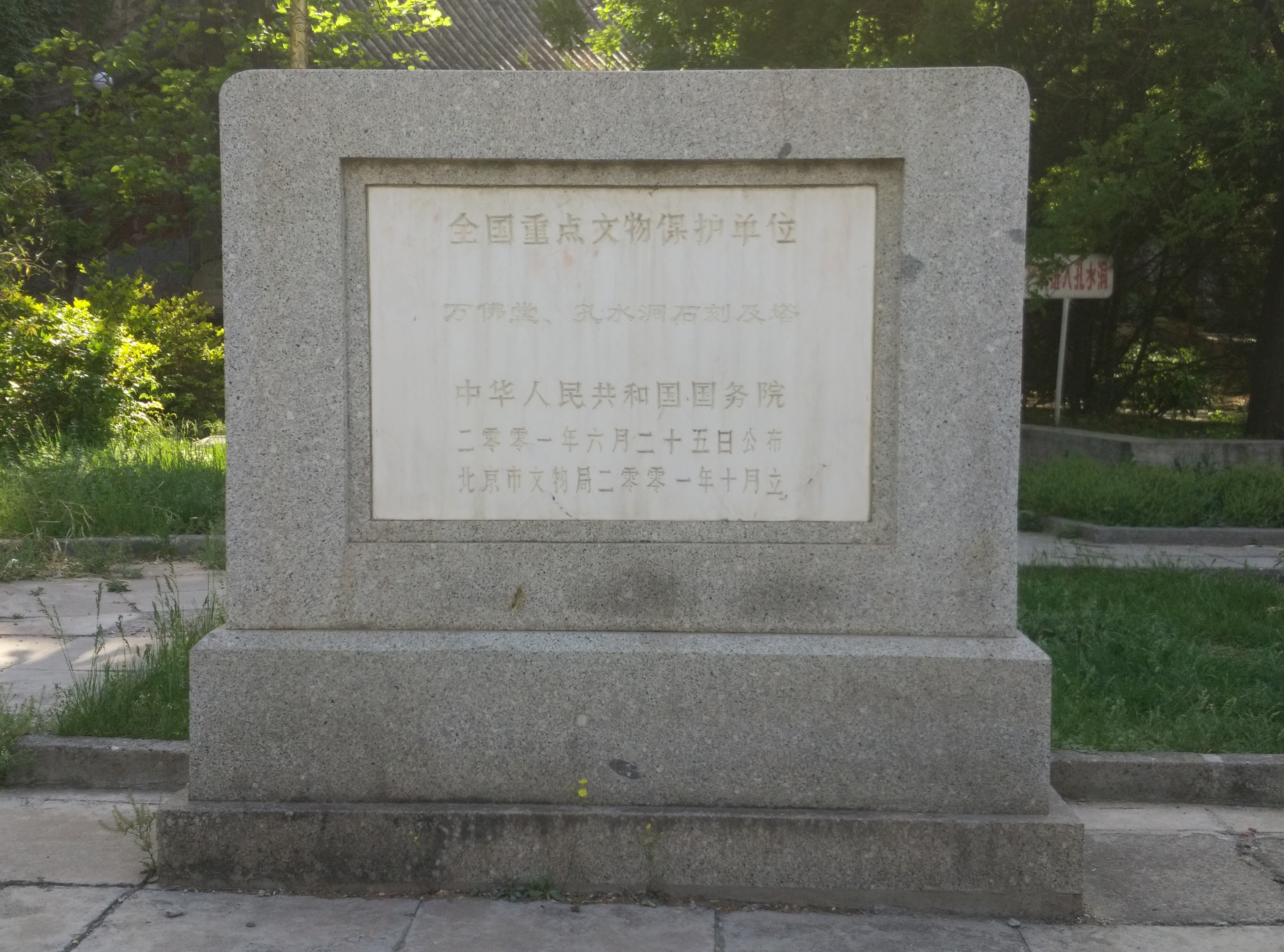 万佛堂文保碑正面照片